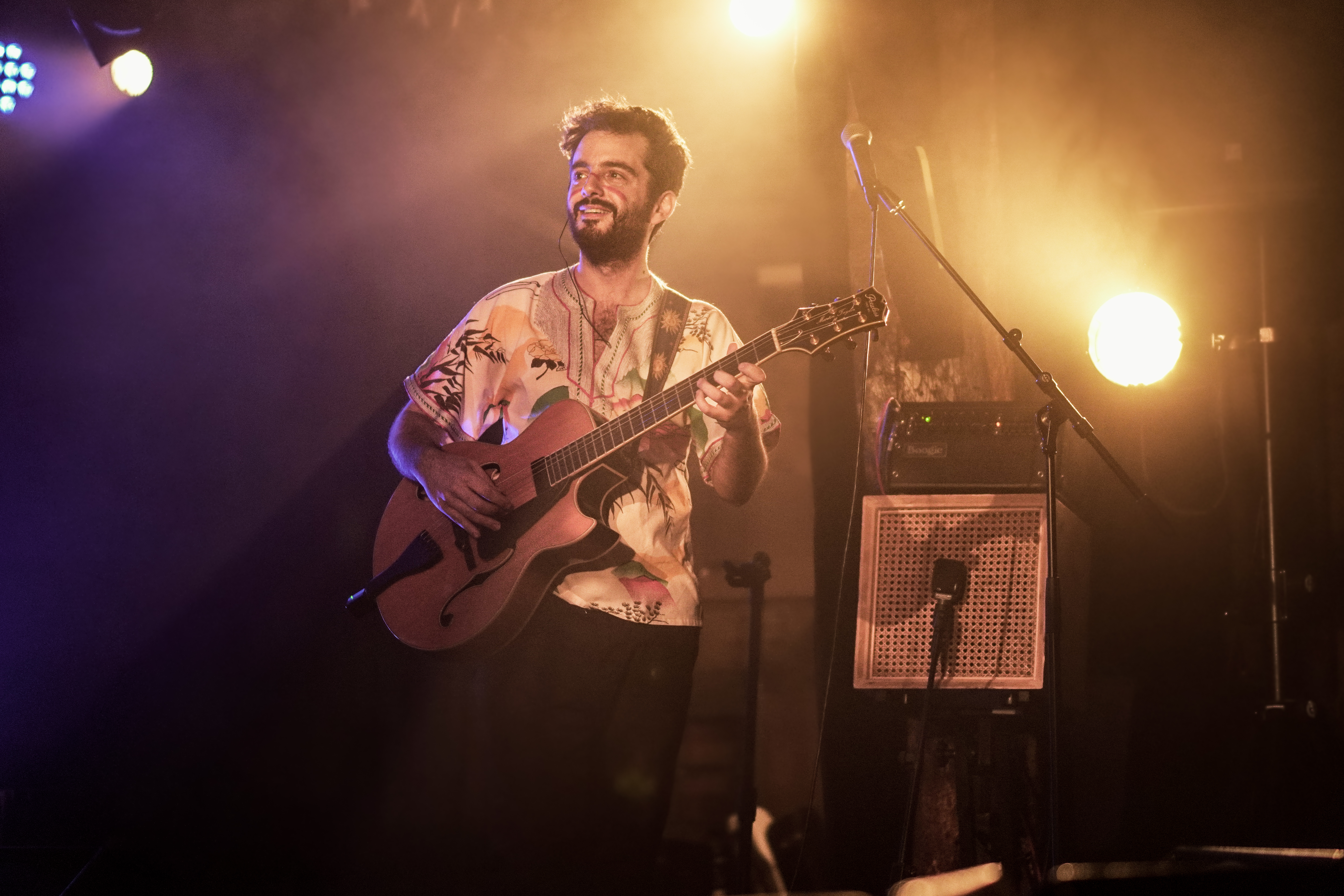 Flora Courier au CaféMUsic